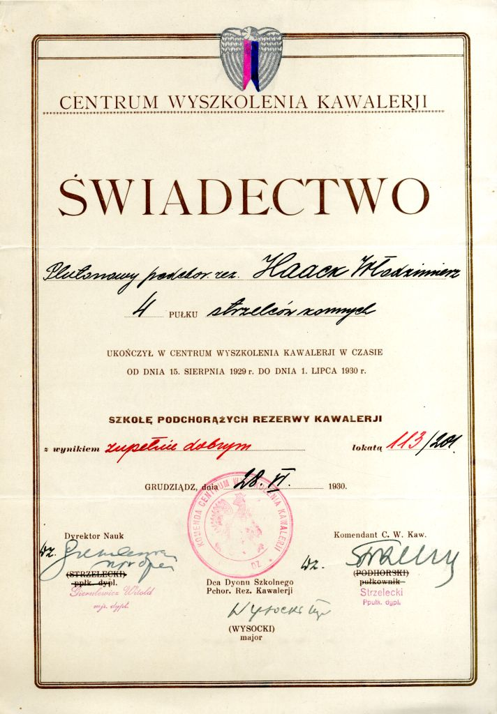 Centrum Wyszkolenia Kawalerii - Włodzimierza Haack - świadectwo ukończenia Szkoły Podchorążych Rezerwy Kawalerii